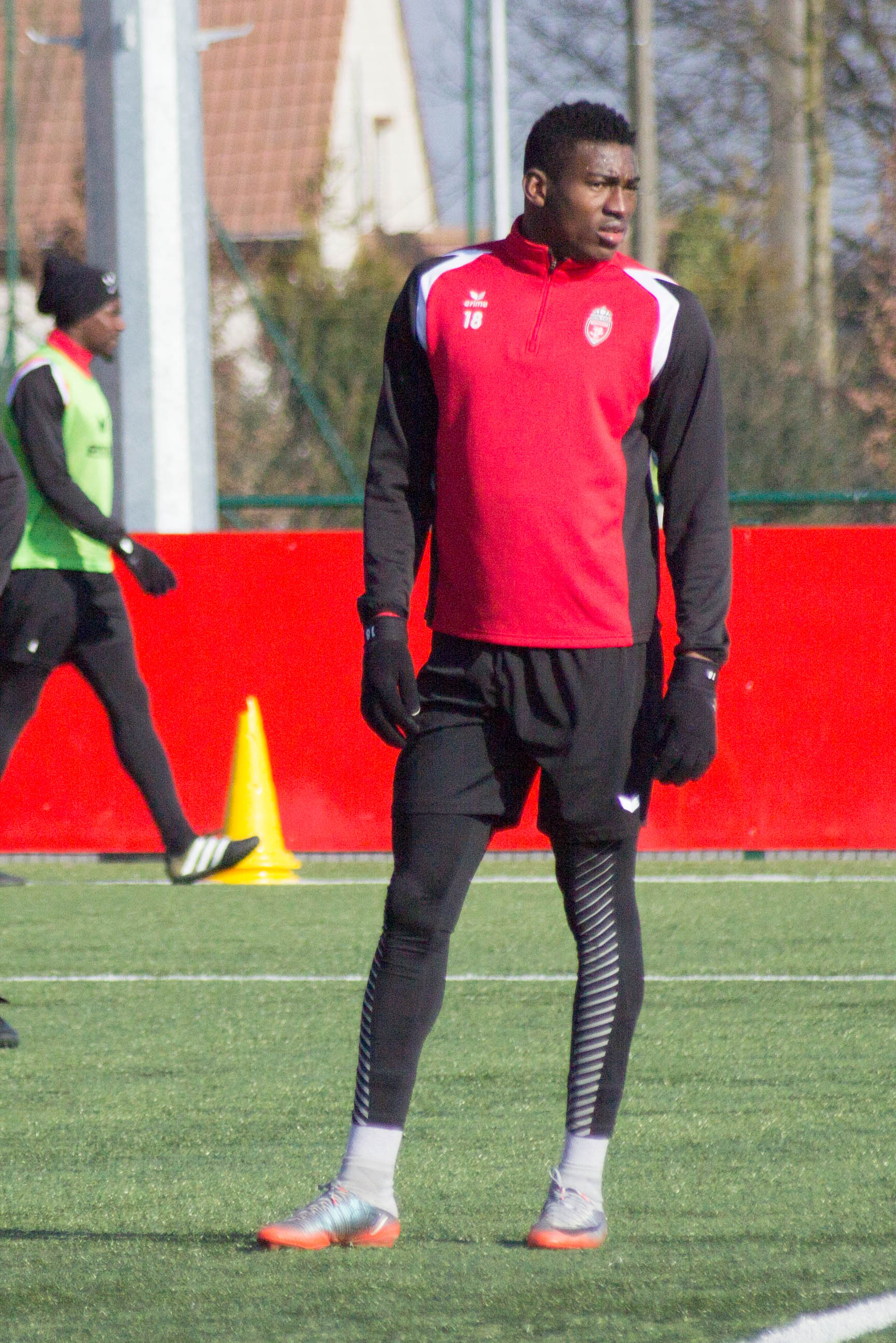 Entraînement du Royal Excel Mouscron, au Futurosport( Mouscron). Le 22 février 2018.